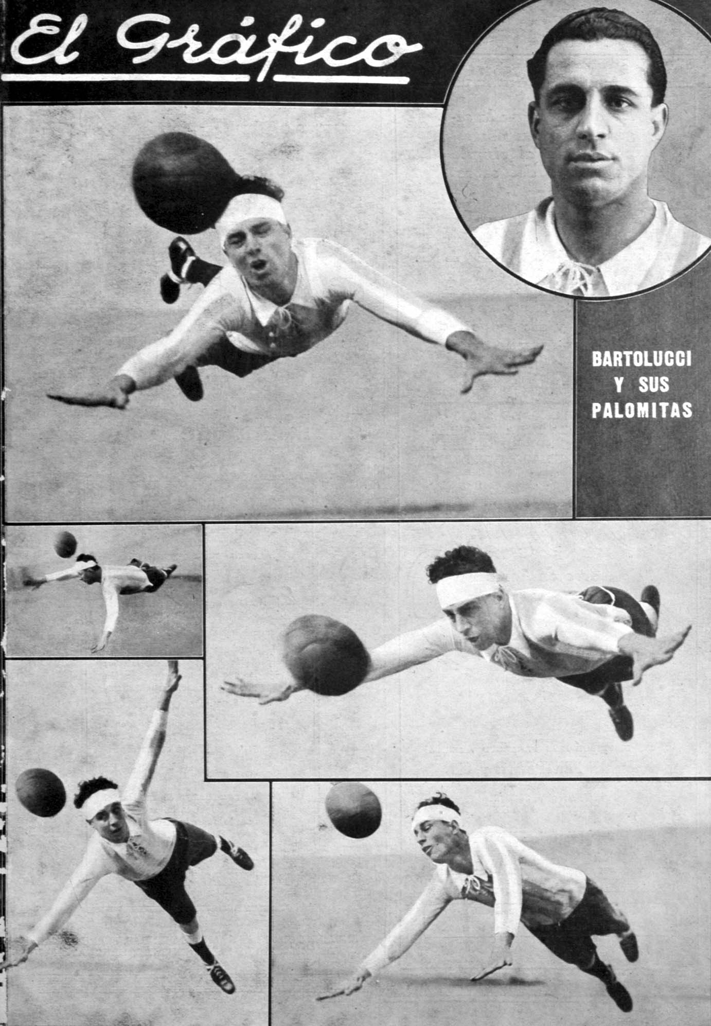 El Grafico del 17 de Agosto de 1929. Edicion 528